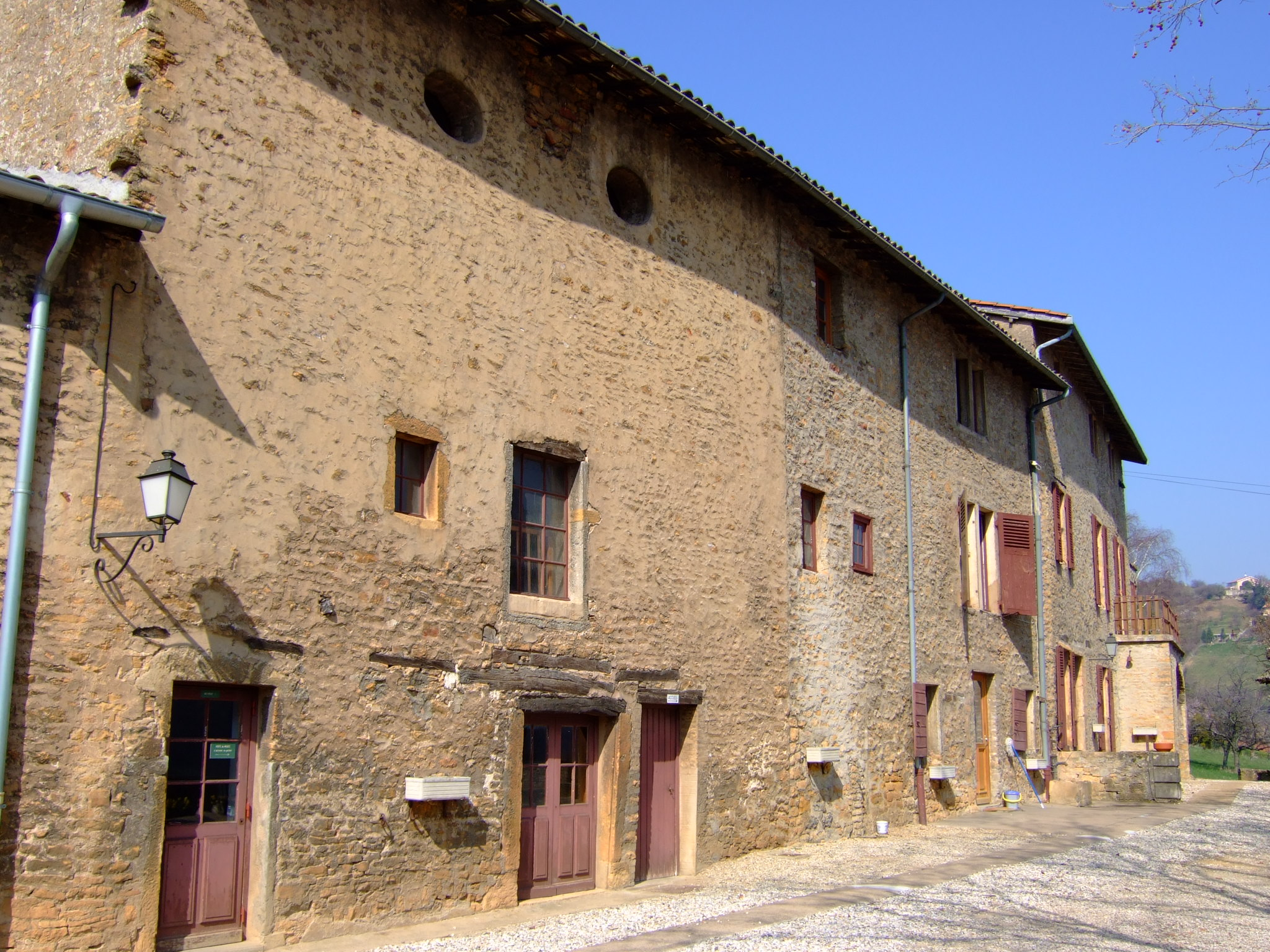 Le musée consacré à André-Marie Ampère, à Poleymieux au Mont d'Or